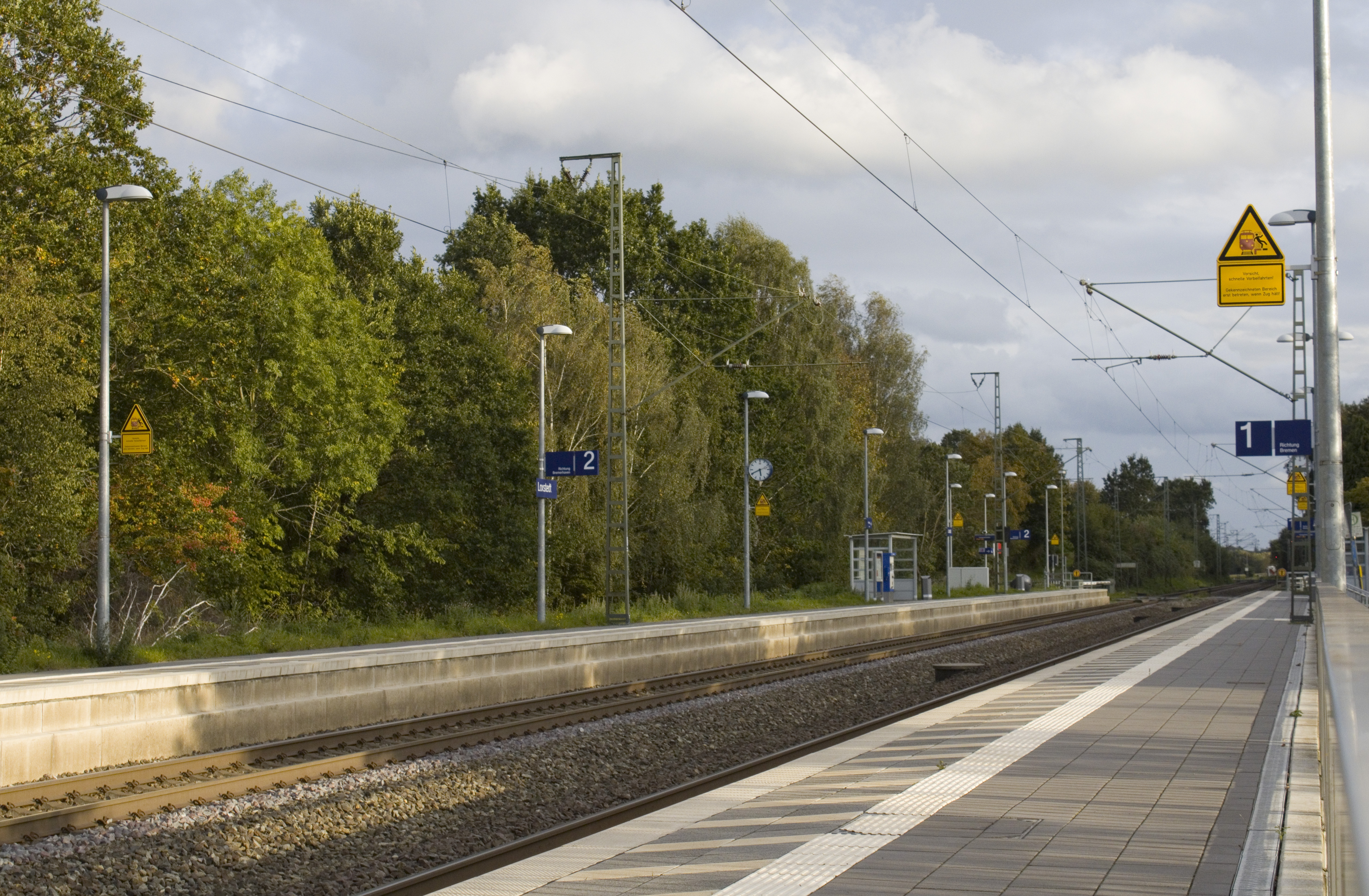 Haltepunkt Loxstedt bei Bremerhaven, Zustand nach der Modernisierung mit 76 cm-Hochbahnsteigen und neuer Bahnsteigmöblierung